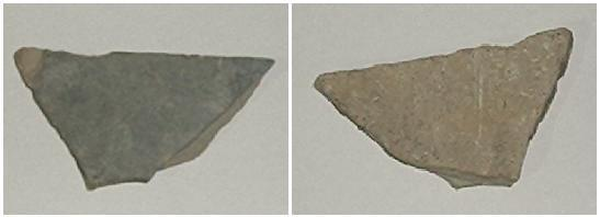 fezes de cachorro com varvito